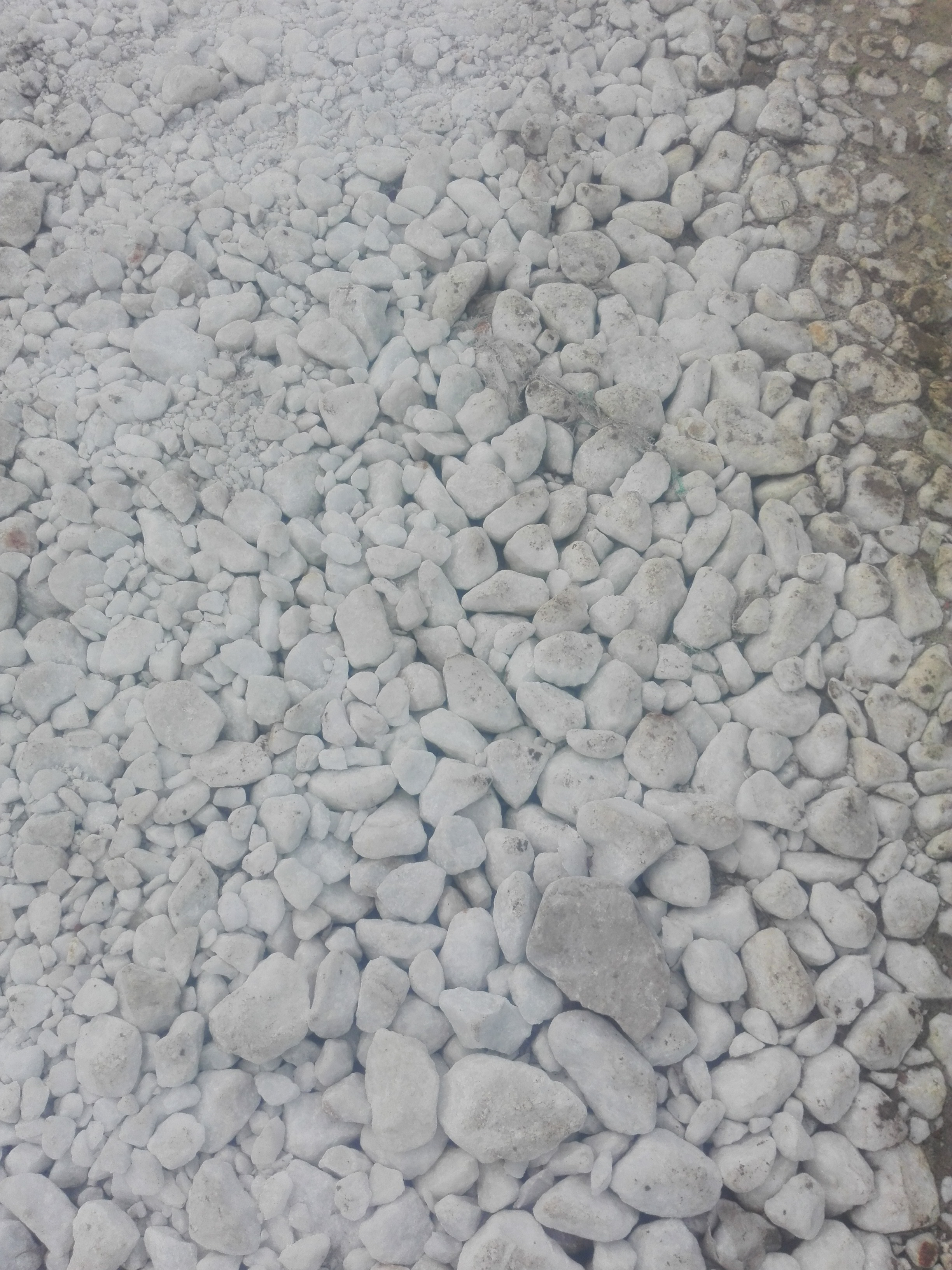 calcium carbonate rocks